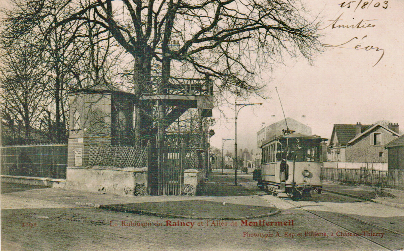 Carte postale ancienne éditée par A. Rep et Filliette à Château Thierry Le Robinson du Raincy et l'Allée de Montfermeil Vue en gros plan d'une motrice du tramway du Raincy à Montfermeil